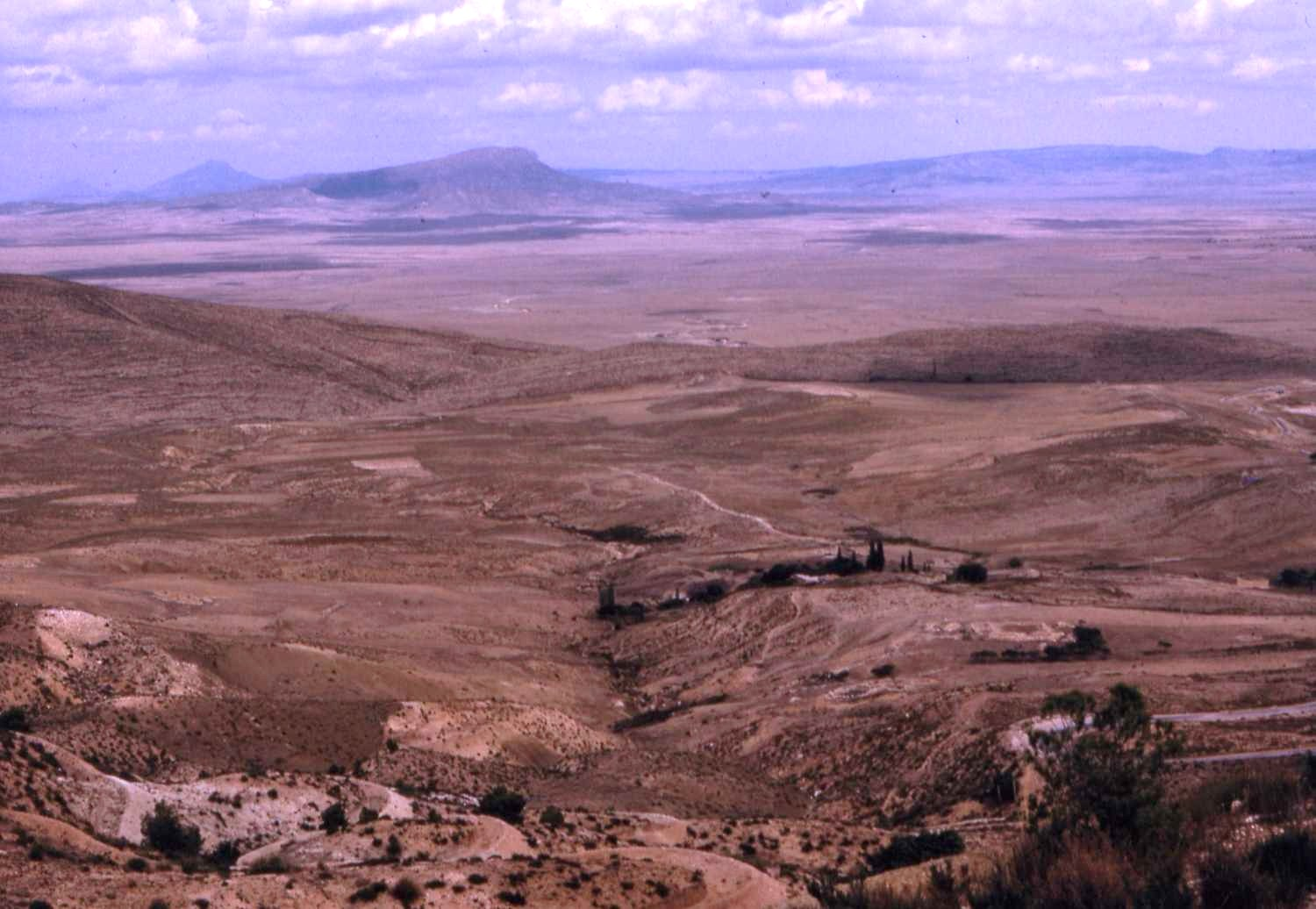 Paysages des Nememcha, Algérie.